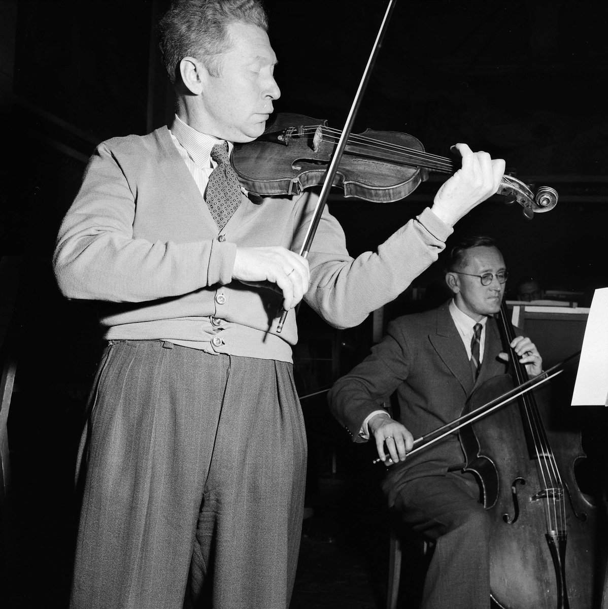 Ernst Glaser (1904–1979), var en tysk-norsk fiolinist. Karl Andersen (1903–1970) on cello, this is a practice session with the Oslo Philharmonic Orchestra in Universitetets Aula in 1953